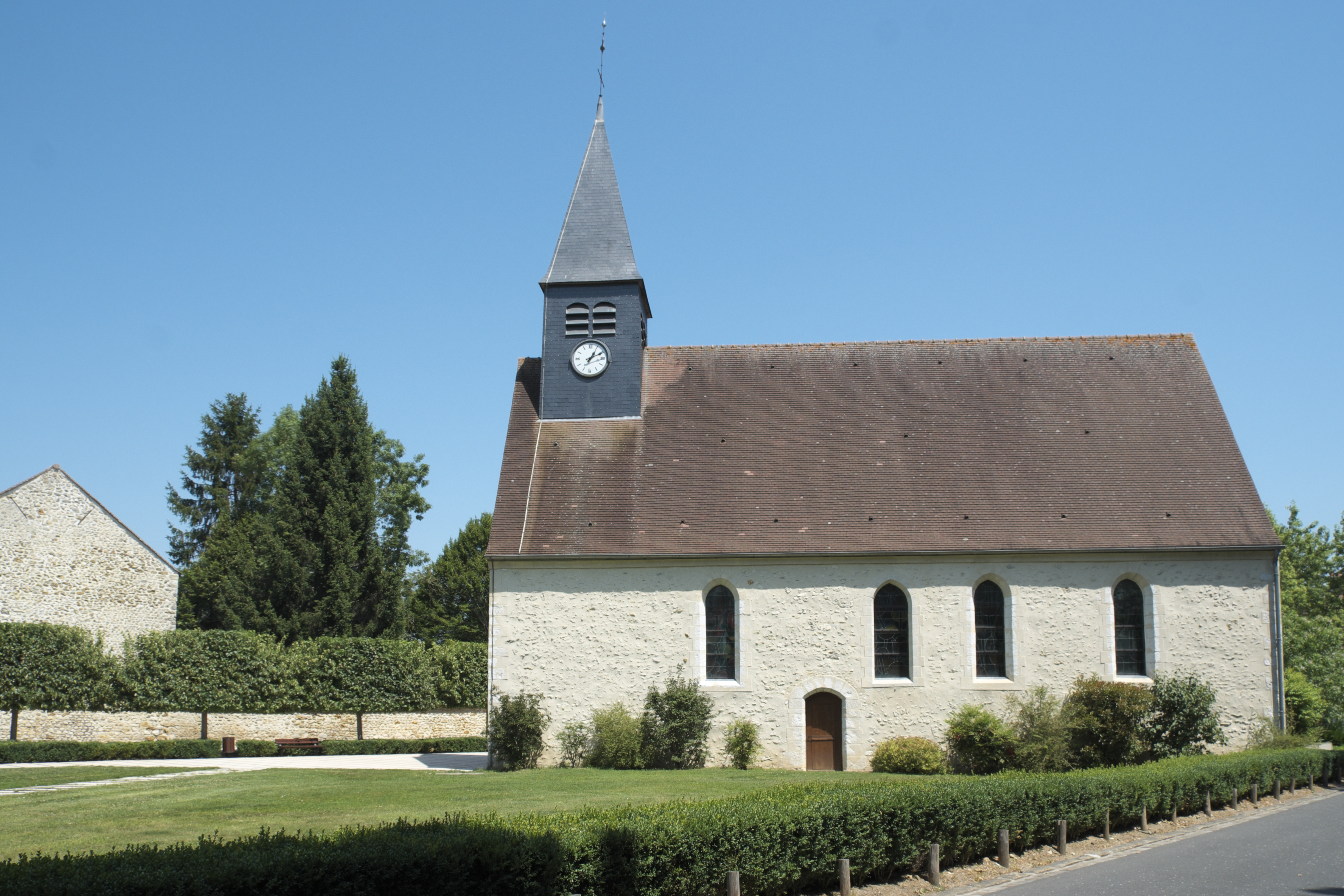 Katholische Kirche Saint-Sulpice in Varennes-Jarcy im Département Essonne (Region Île-de-France/Frankreich)